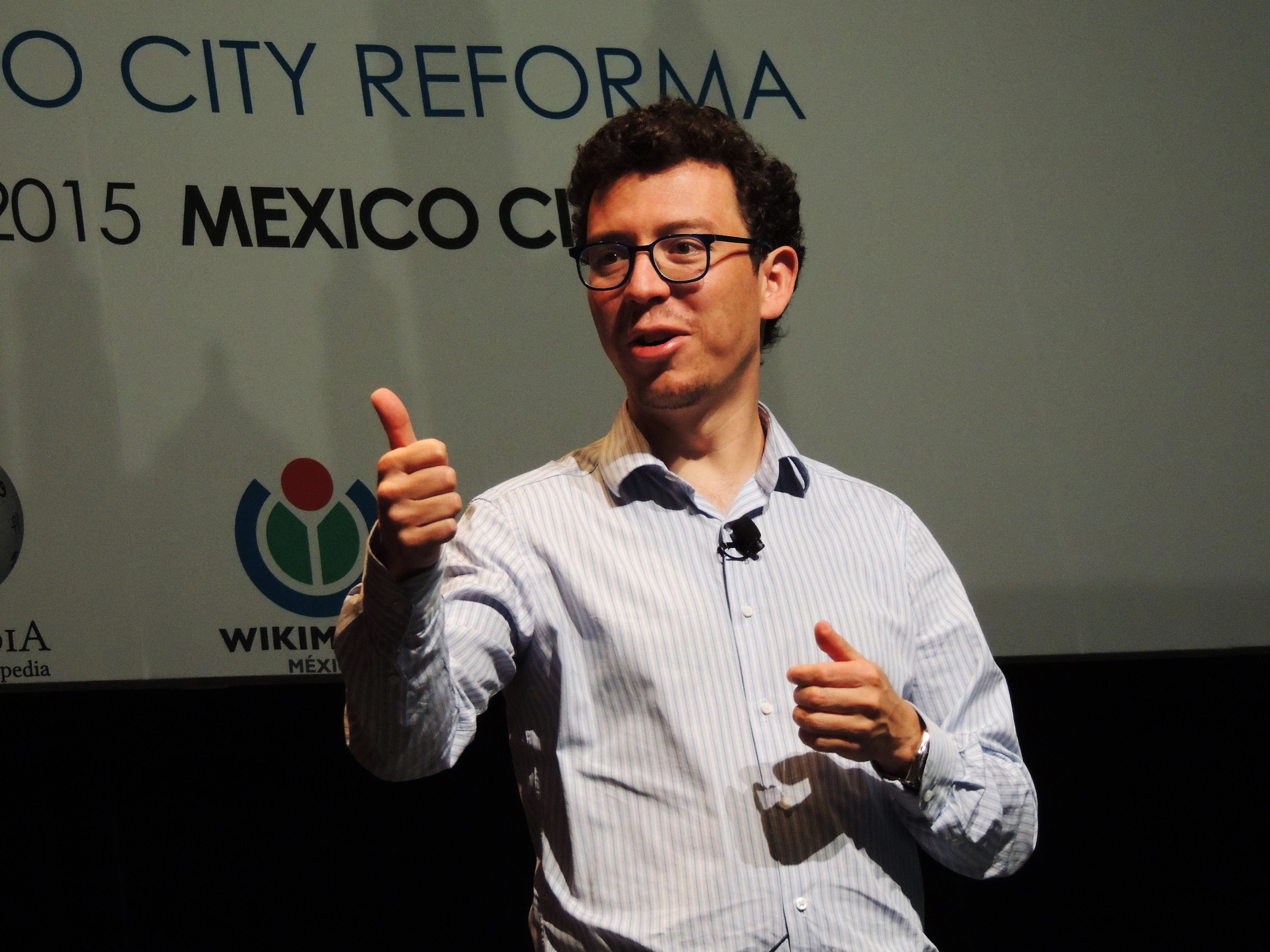 Wikimanía, day 4. Conference of Luis von Ahn, Duolingo CEO.